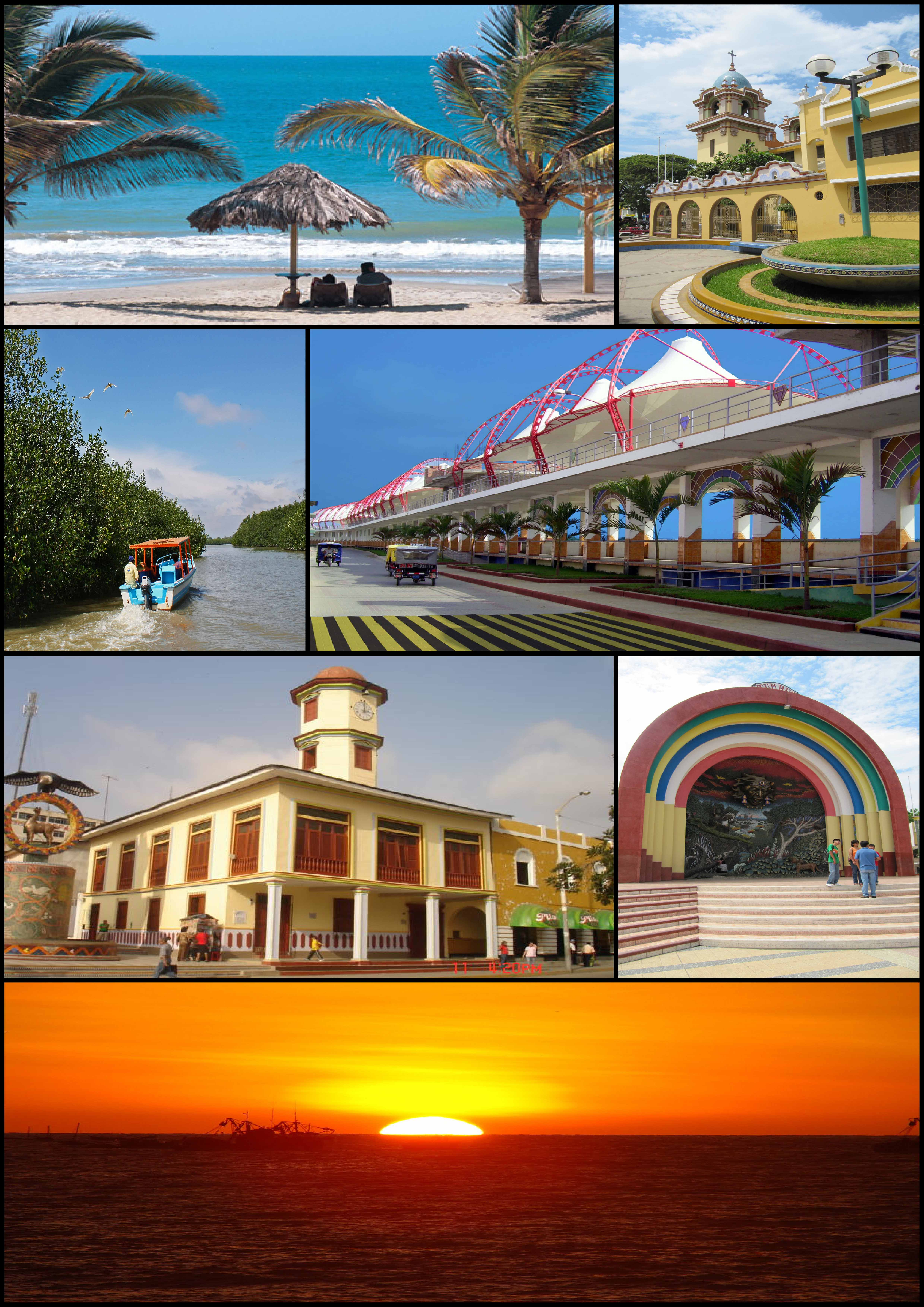 Ciudad de Tumbes y sus principales atractivos